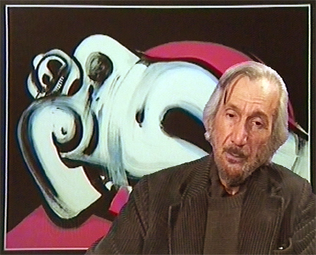 Portrait de John Christoforou